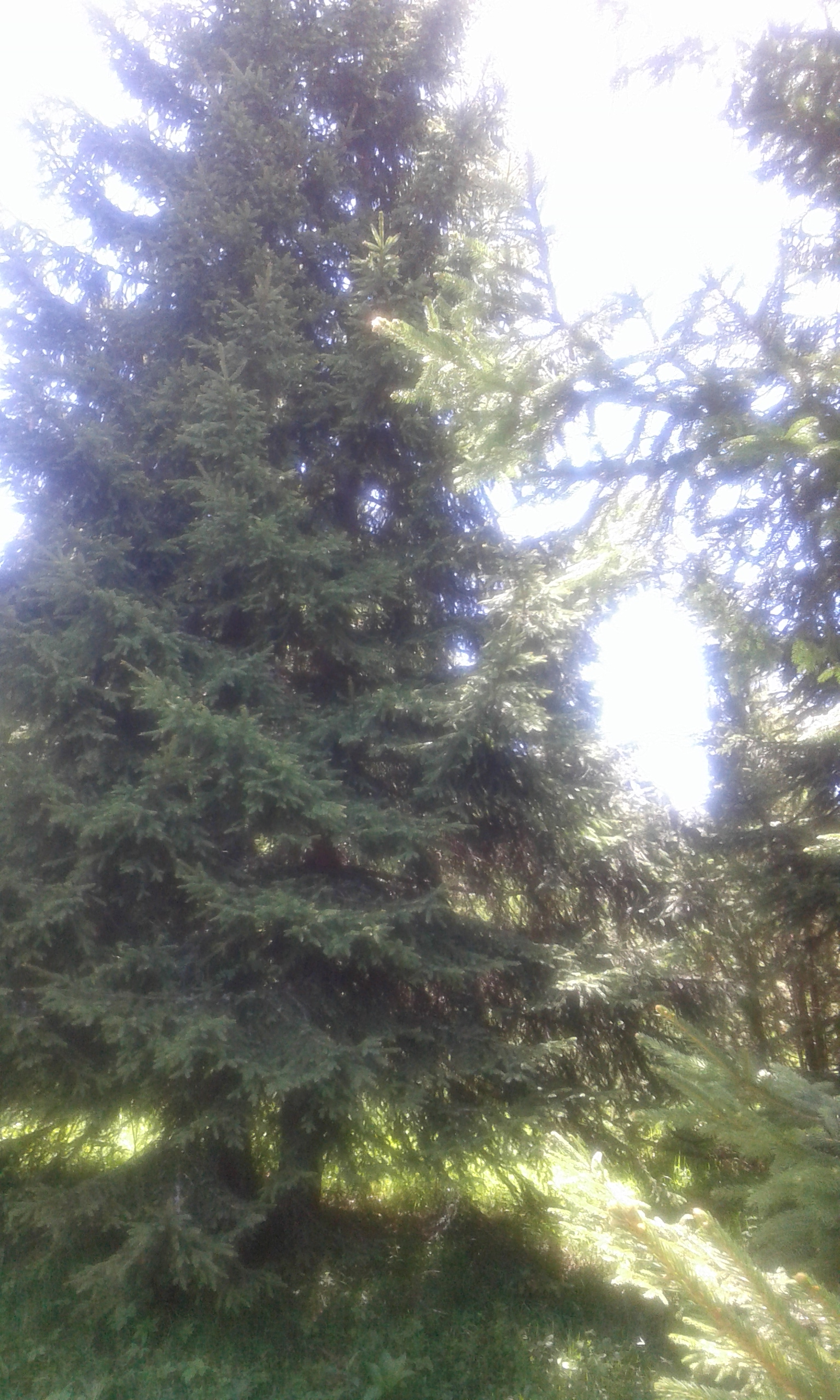 Српски (ћирилица): Шума на Чемерској планини, Општина Илијаш, Кантон Сарајево, ФБиХ.